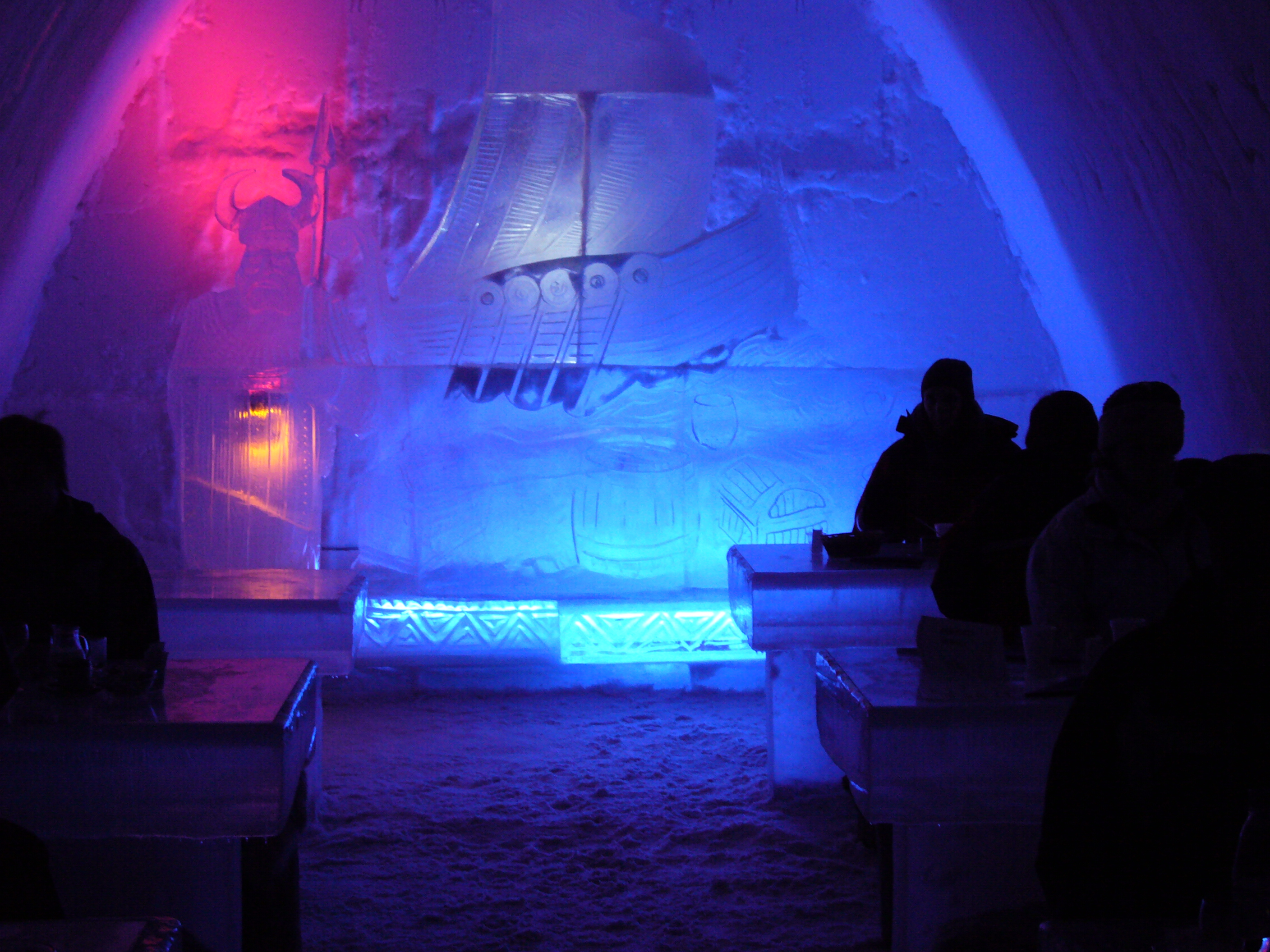 castello di neve "lumilinna", kemi, lapponia finlandese